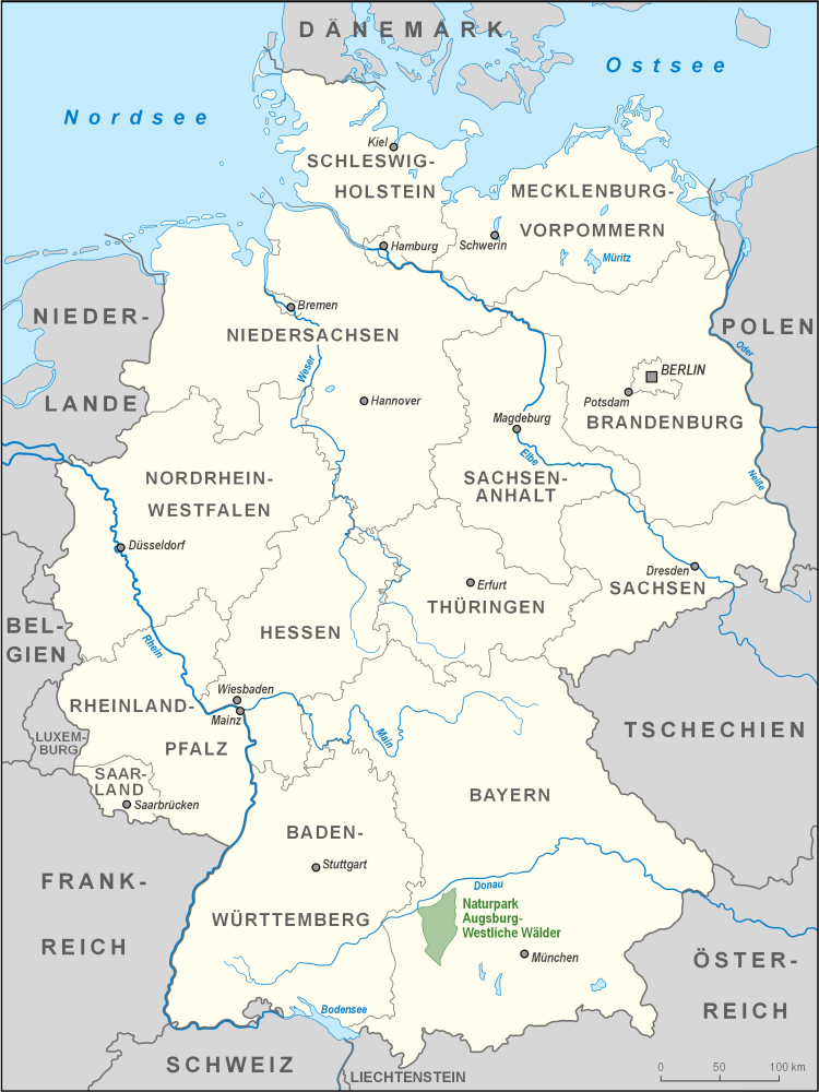 Karte des Naturparks Augsburg-Westliche Wälder in Deutschland